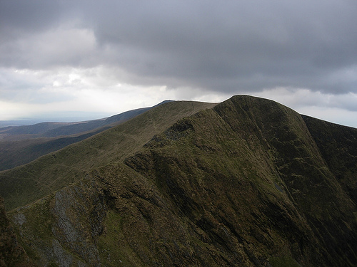 Trum y Ddysgl from Mynydd Drws-y-coed